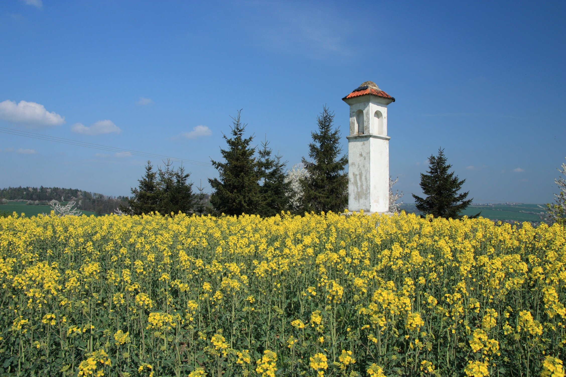 Boží muka, při silnici z Bílovce do Pohořílek, Bílov (okres Nový Jičín).